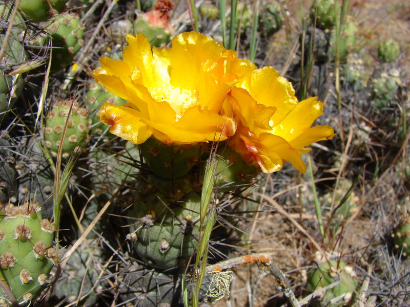 Camino al Parque Nacional Fray Jorge